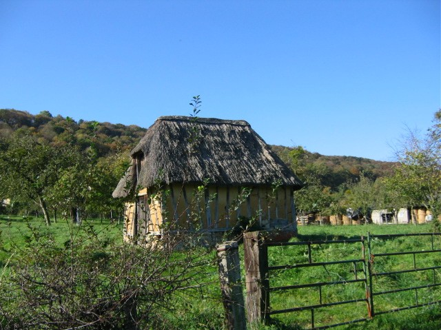 Chaumière dans le Marais Vernier, Eure